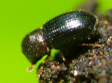 Hypothenemus hampei. Mudigere, Karnataka.